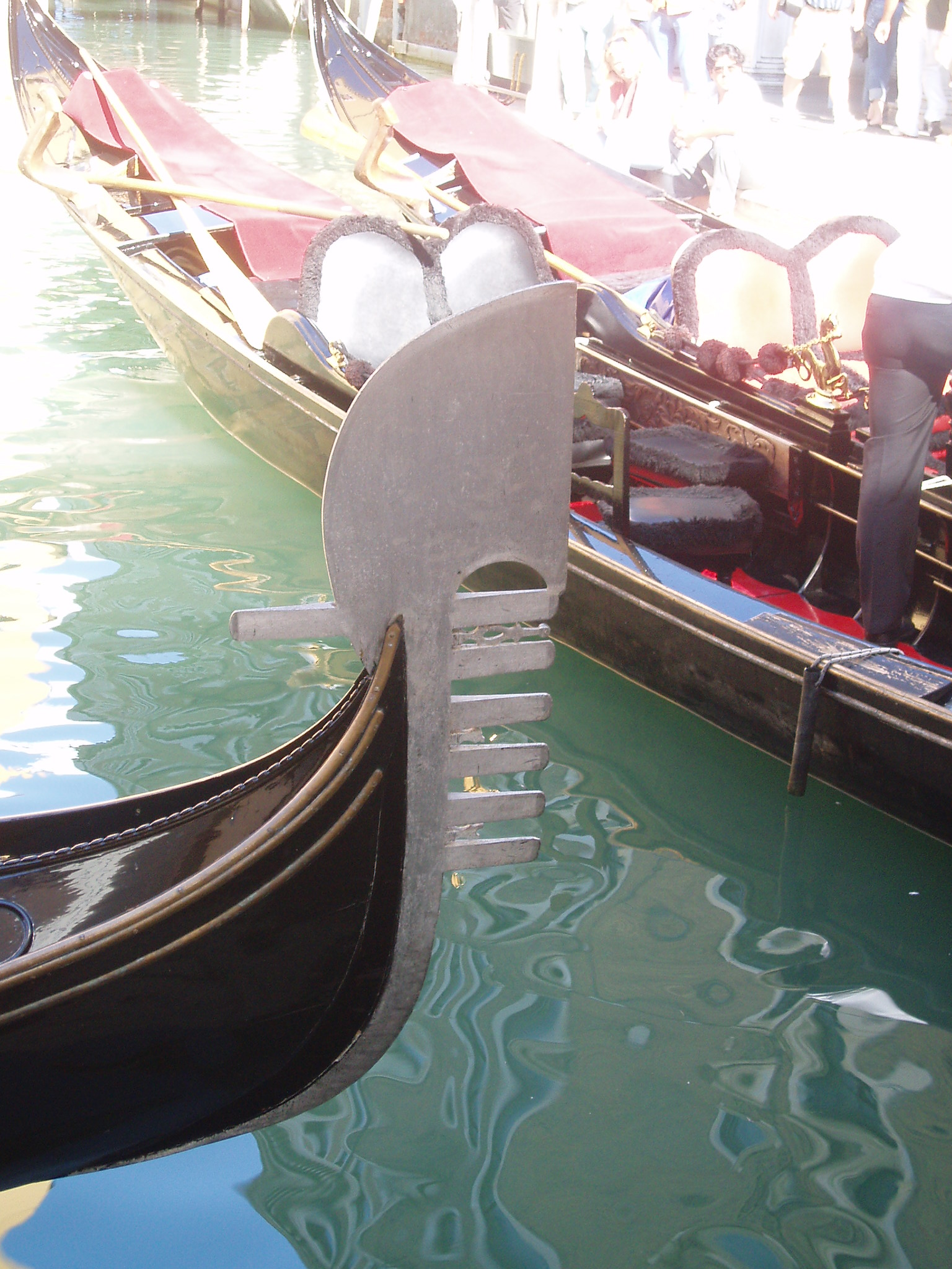 ferro de gondole venise